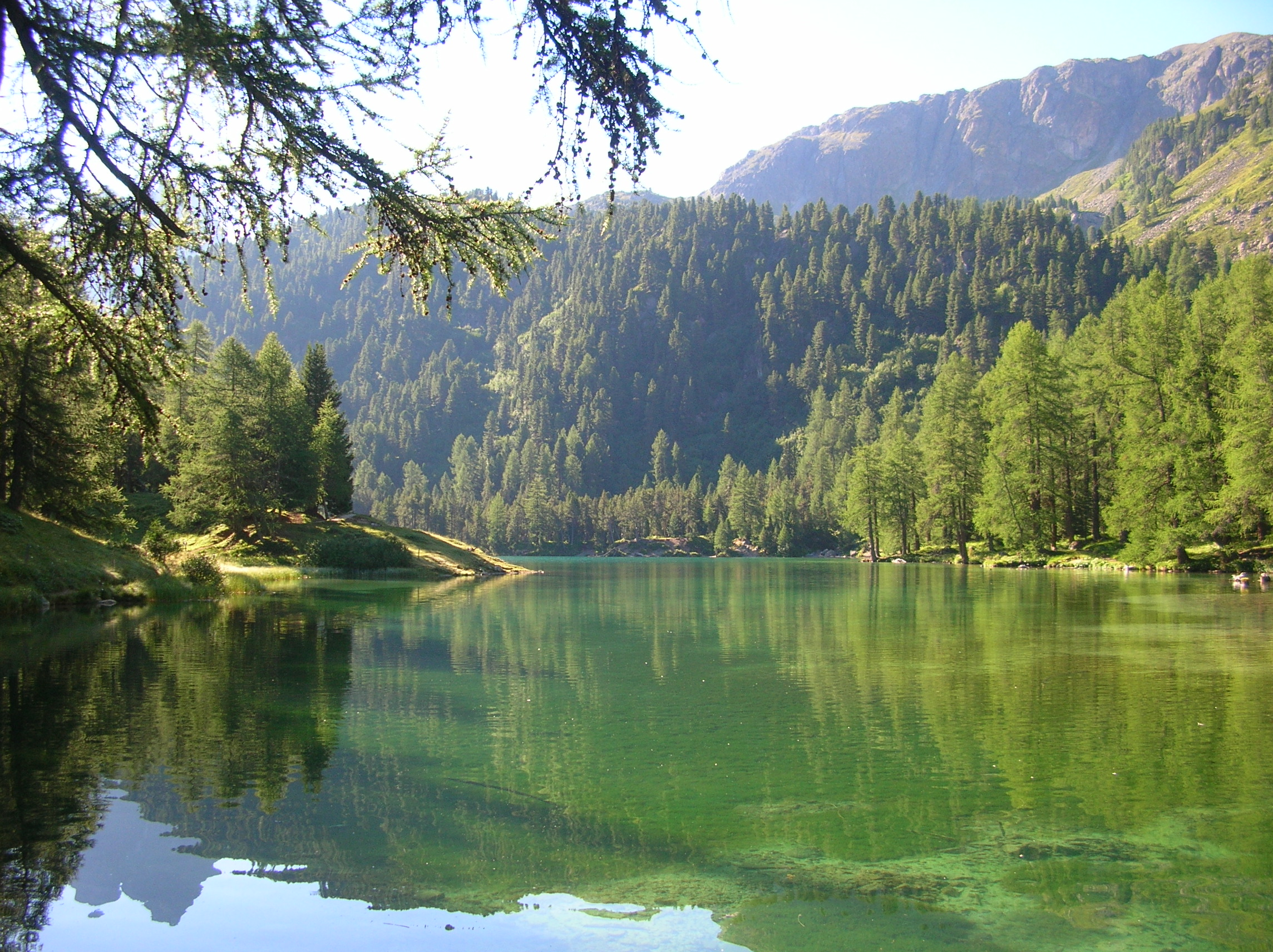 Lac de Palpuogna Rumantsch: Lai da Palpuogna